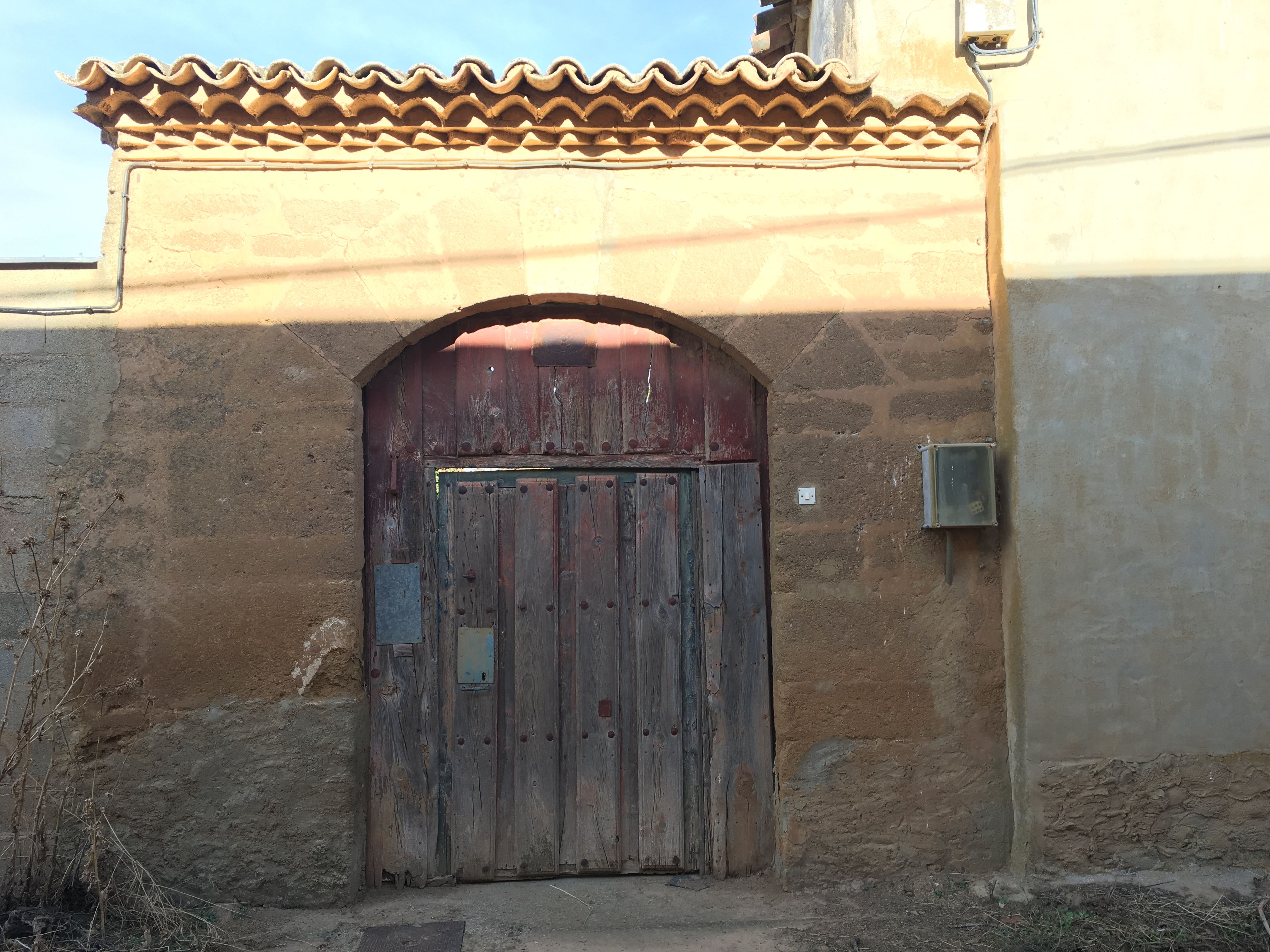 Villaesper Milenario